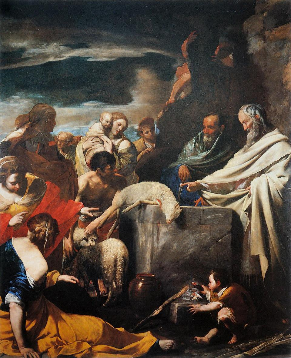 Sacrificio di Mosètitle QS:P1476,it:"Sacrificio di Mosè" label QS:Lit,"Sacrificio di Mosè"